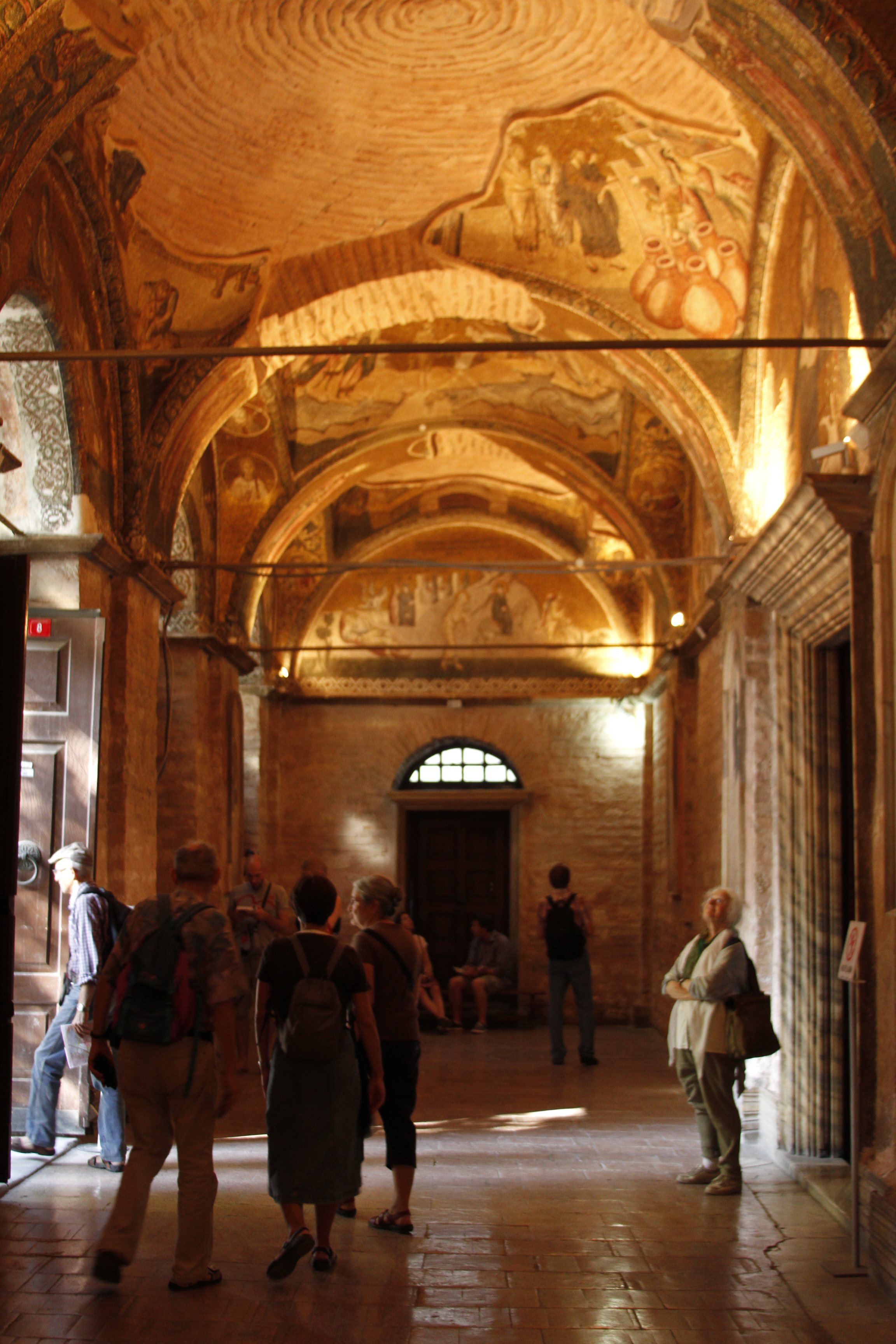 Vista do nártex exterior da Igreja de Chora.